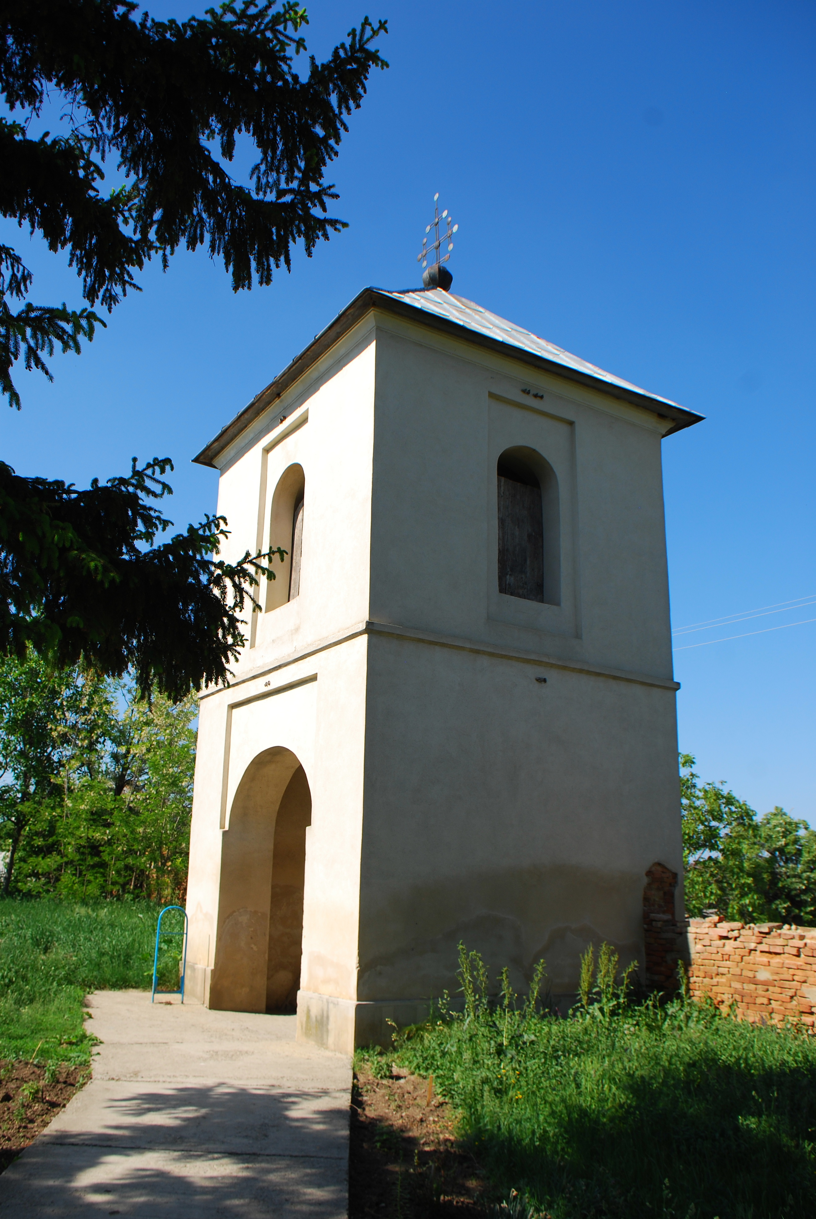 Biserica "Sf. Apostoli"